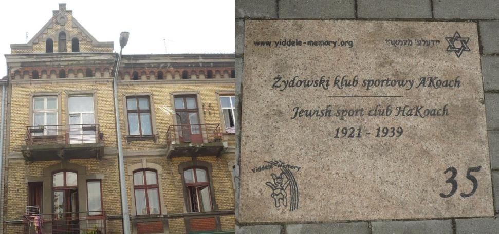 Radomsko. Otwarte Muzeum Żydowskie 35